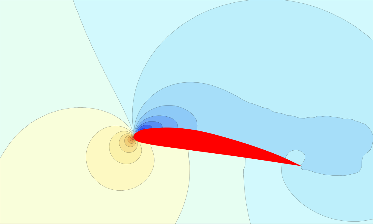 Druckverteilung um einen Flügel